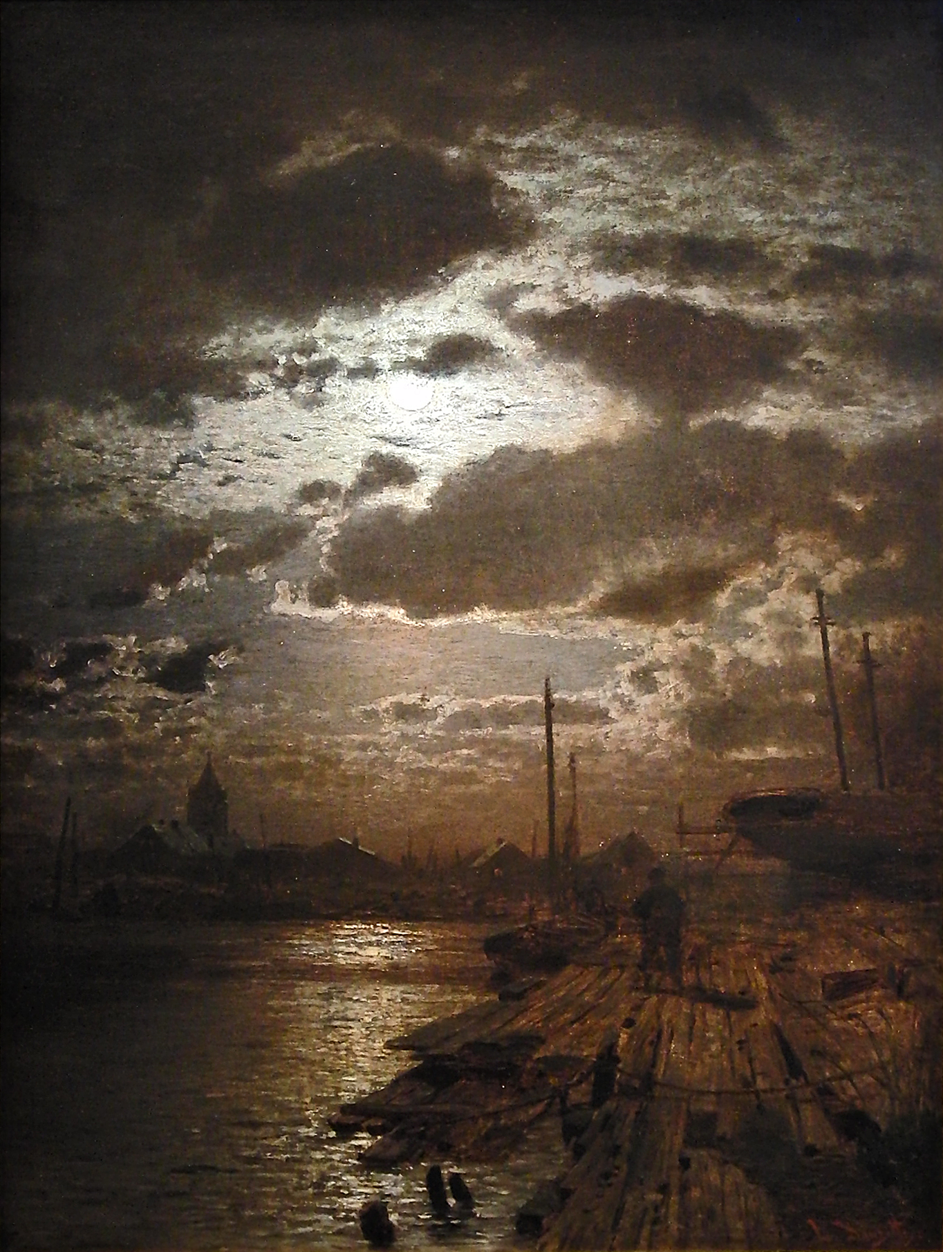 Mondschein über Barther Werft